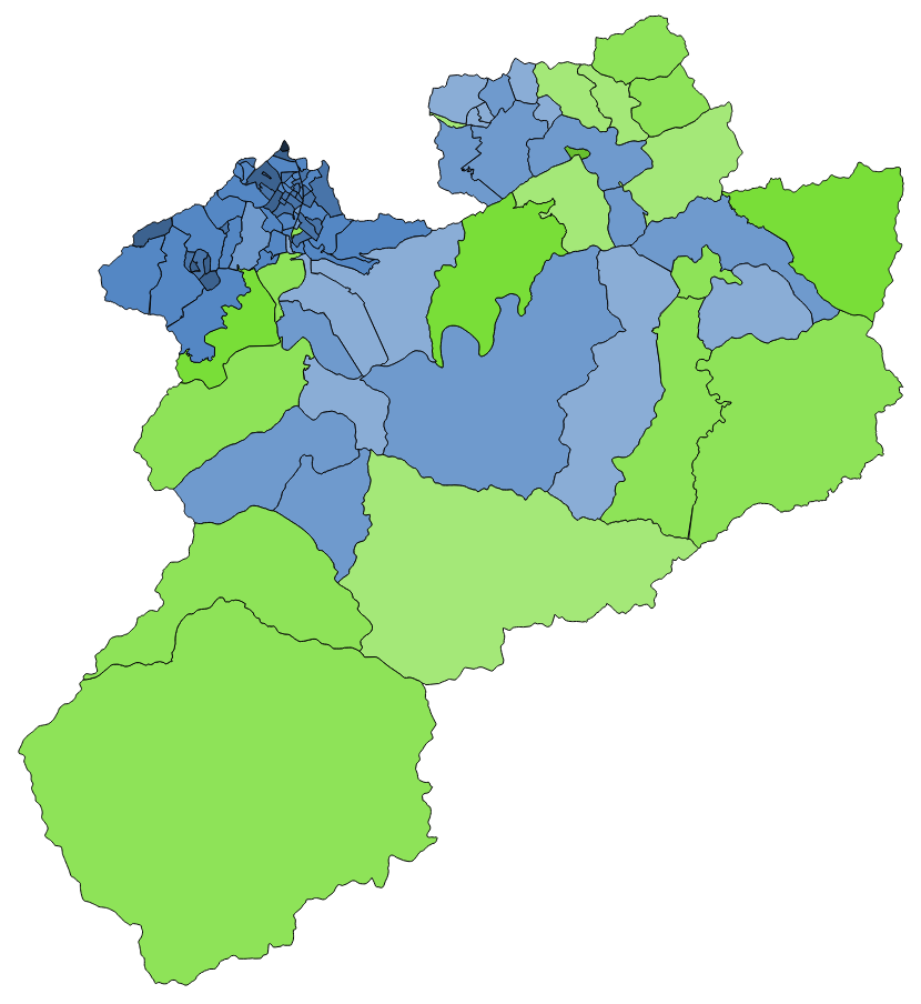 顏色對照表